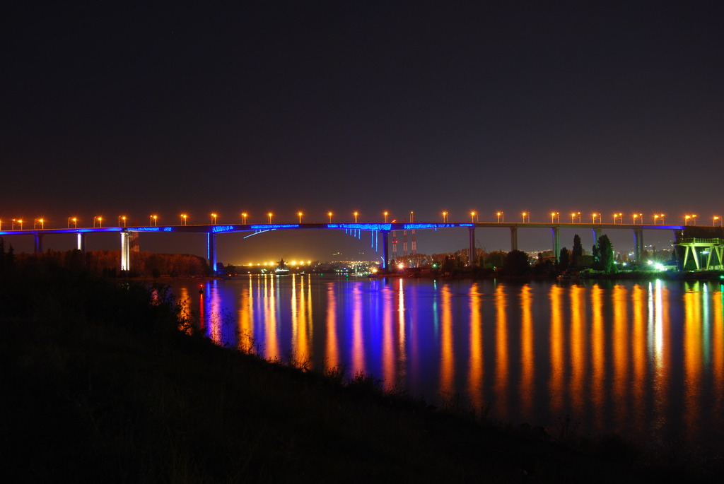 Аспарухов мост през нощта.